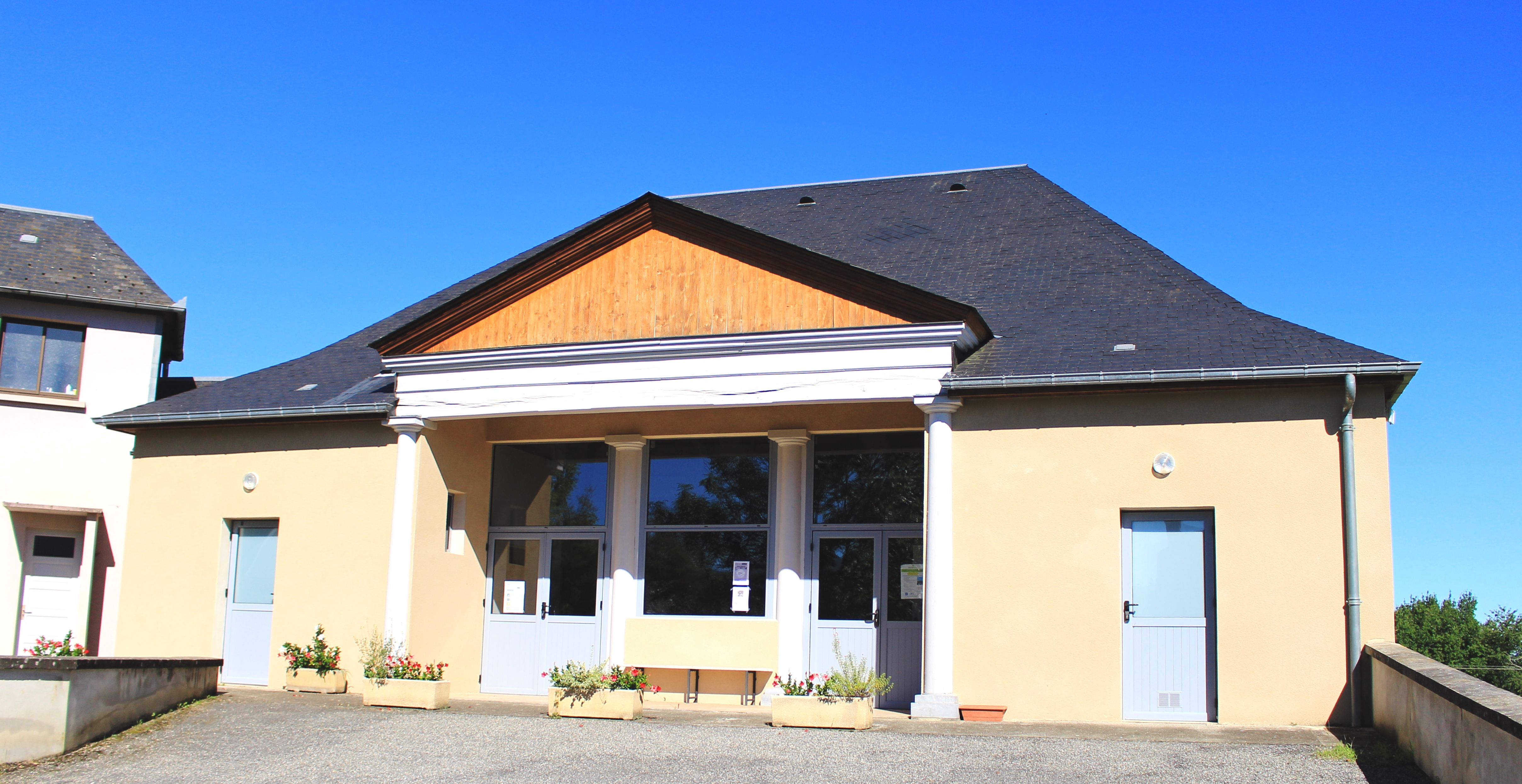 Salle des fêtes de Benqué-Molère (Hautes-Pyrénées)